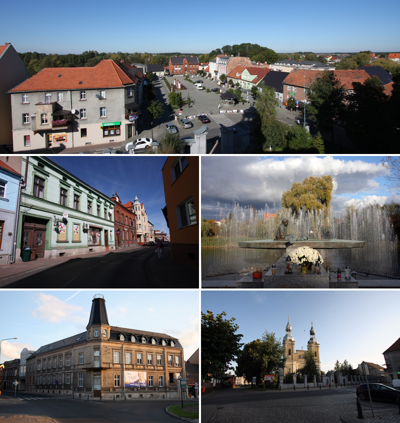 miniatura do art Zbąszyń